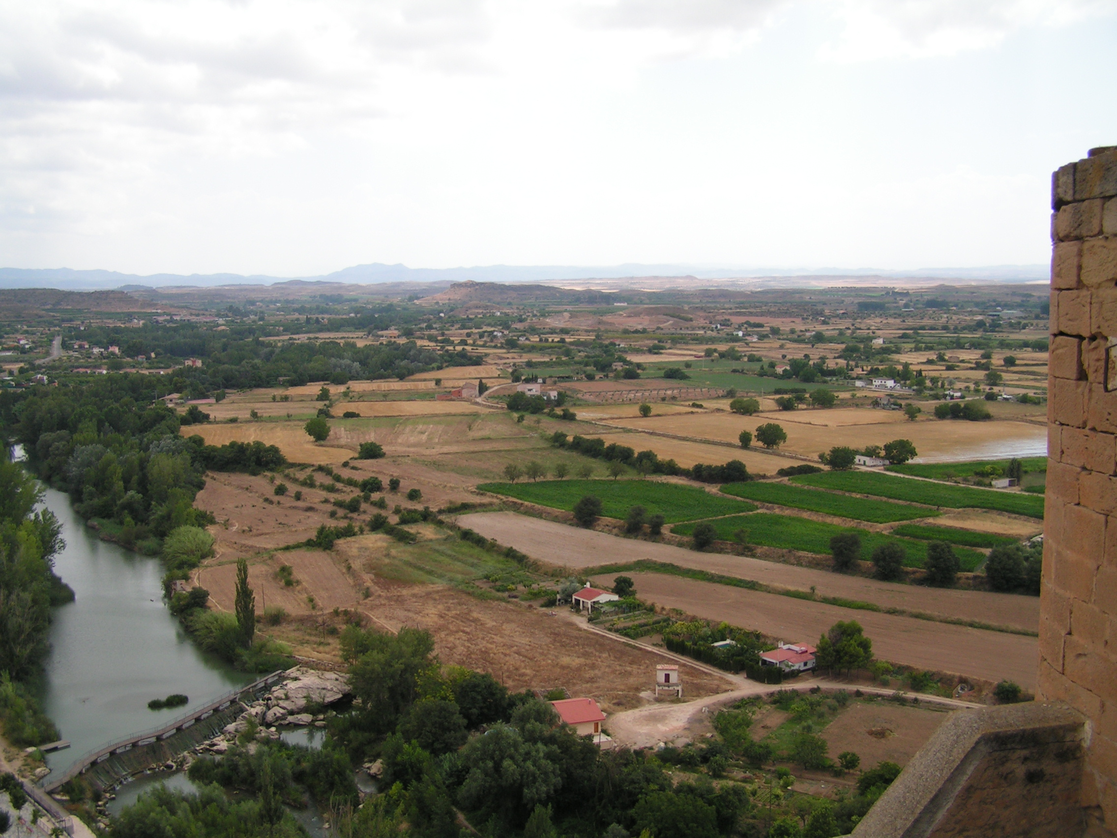 Vista desde el Castillo de Alcañiz (Teruel)